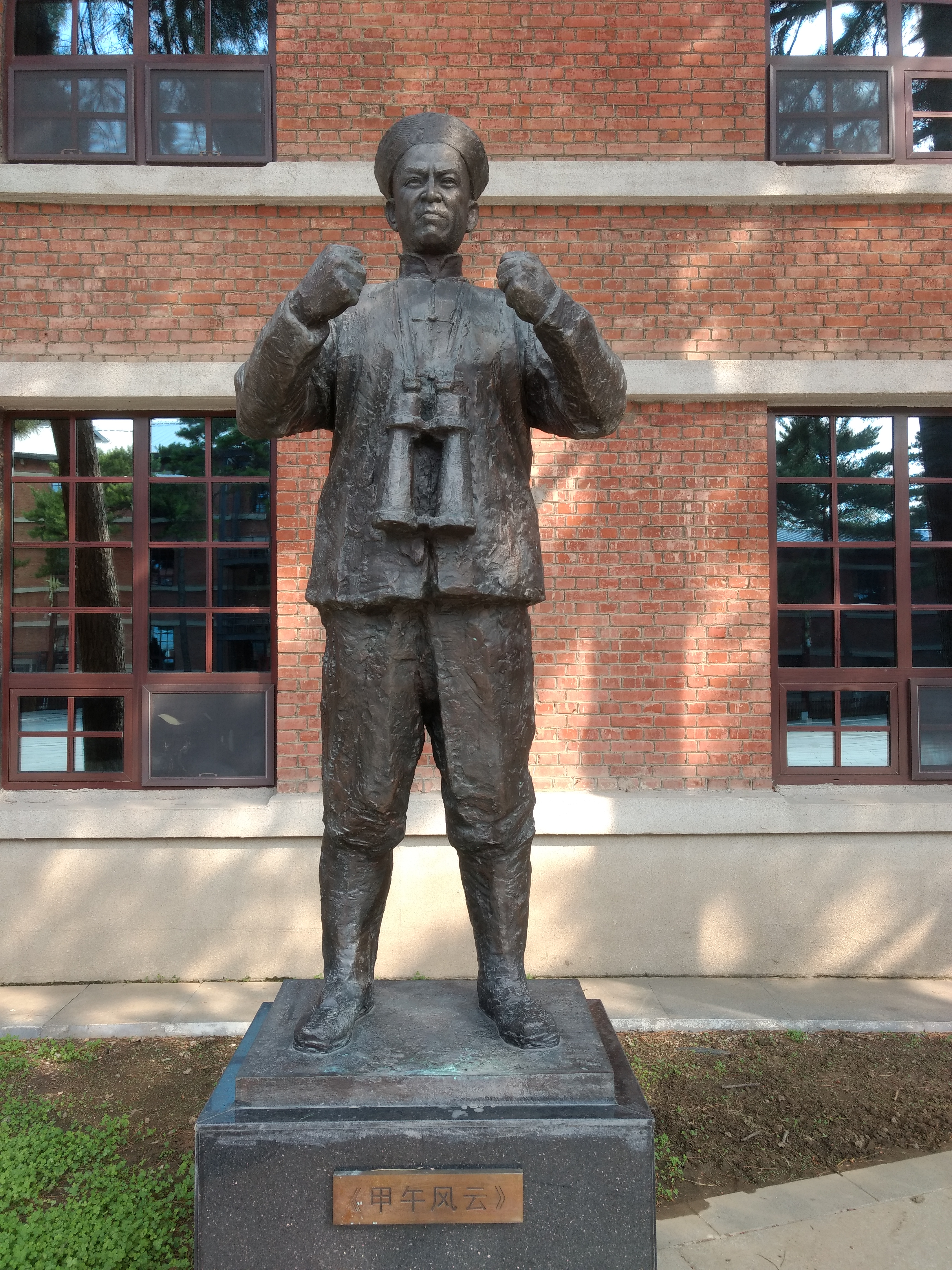 Estàtua als exteriors de l'antic estudi de cinema de Changchun. Representa a l'actor Li Moran tal com apareixia a la pel·lícula de 1962 Jiawu Fengyun.